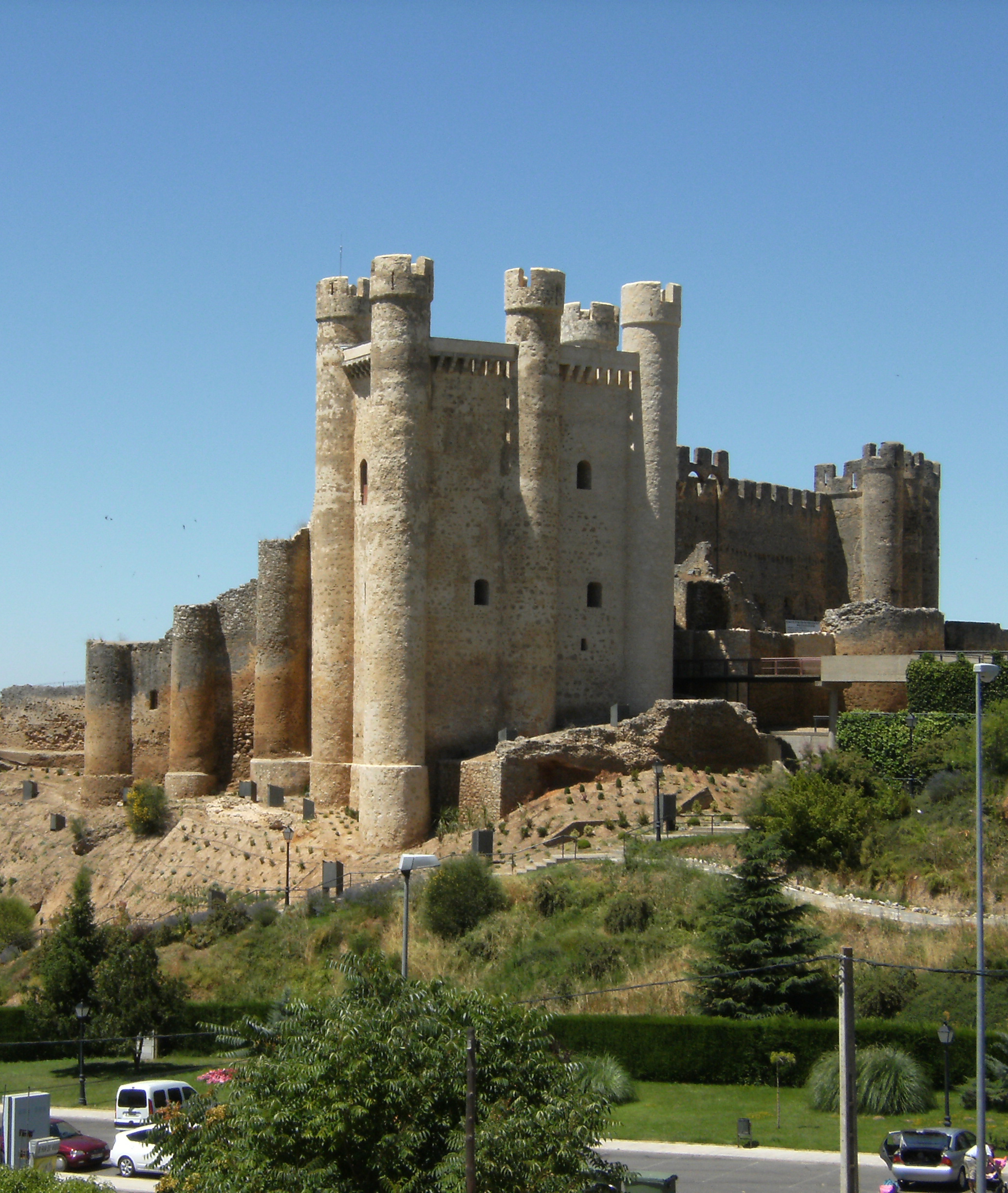 vista desde el Sur